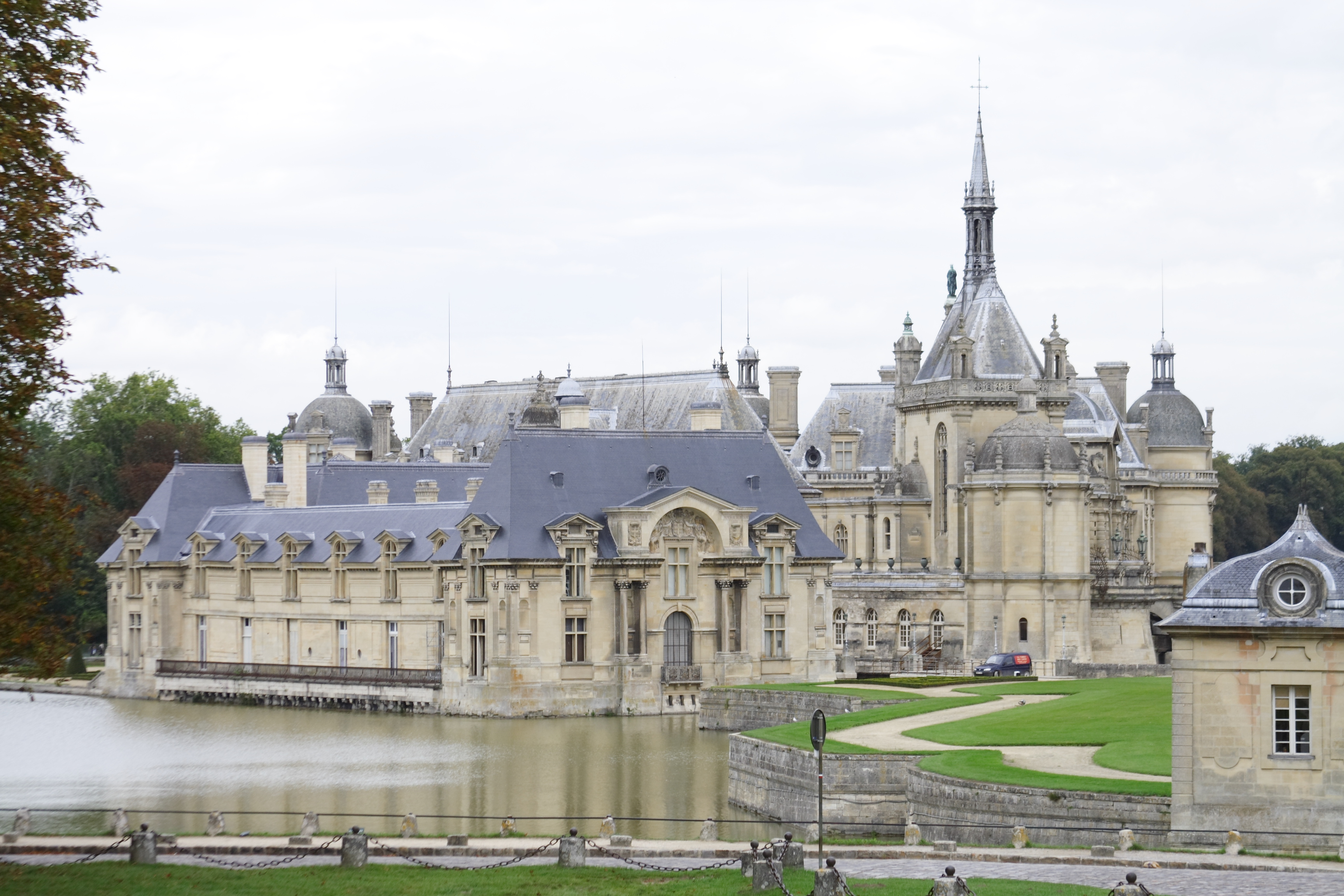 Château de Chantilly(Chantilly, France)